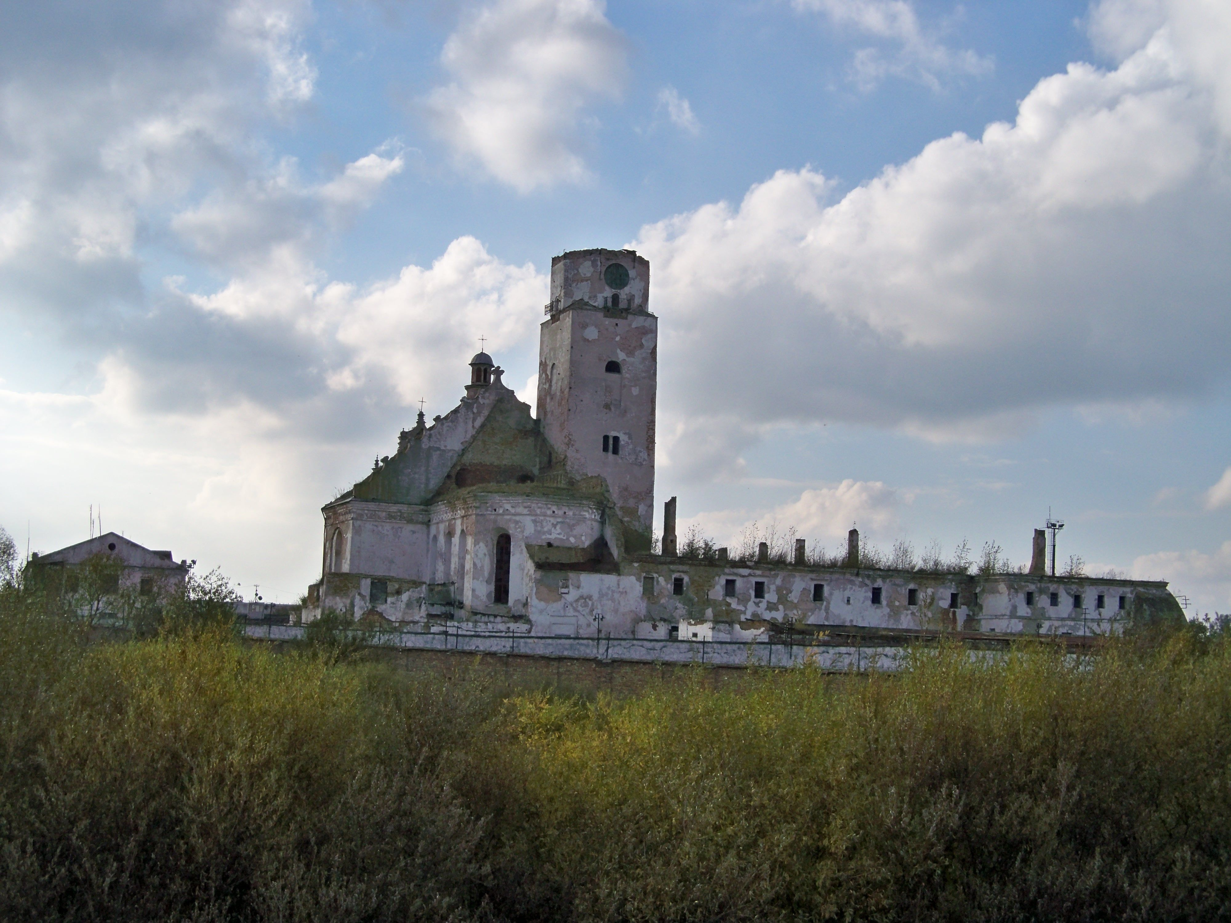 Монастирські келії (мур.), Сокаль, вул.Набережна